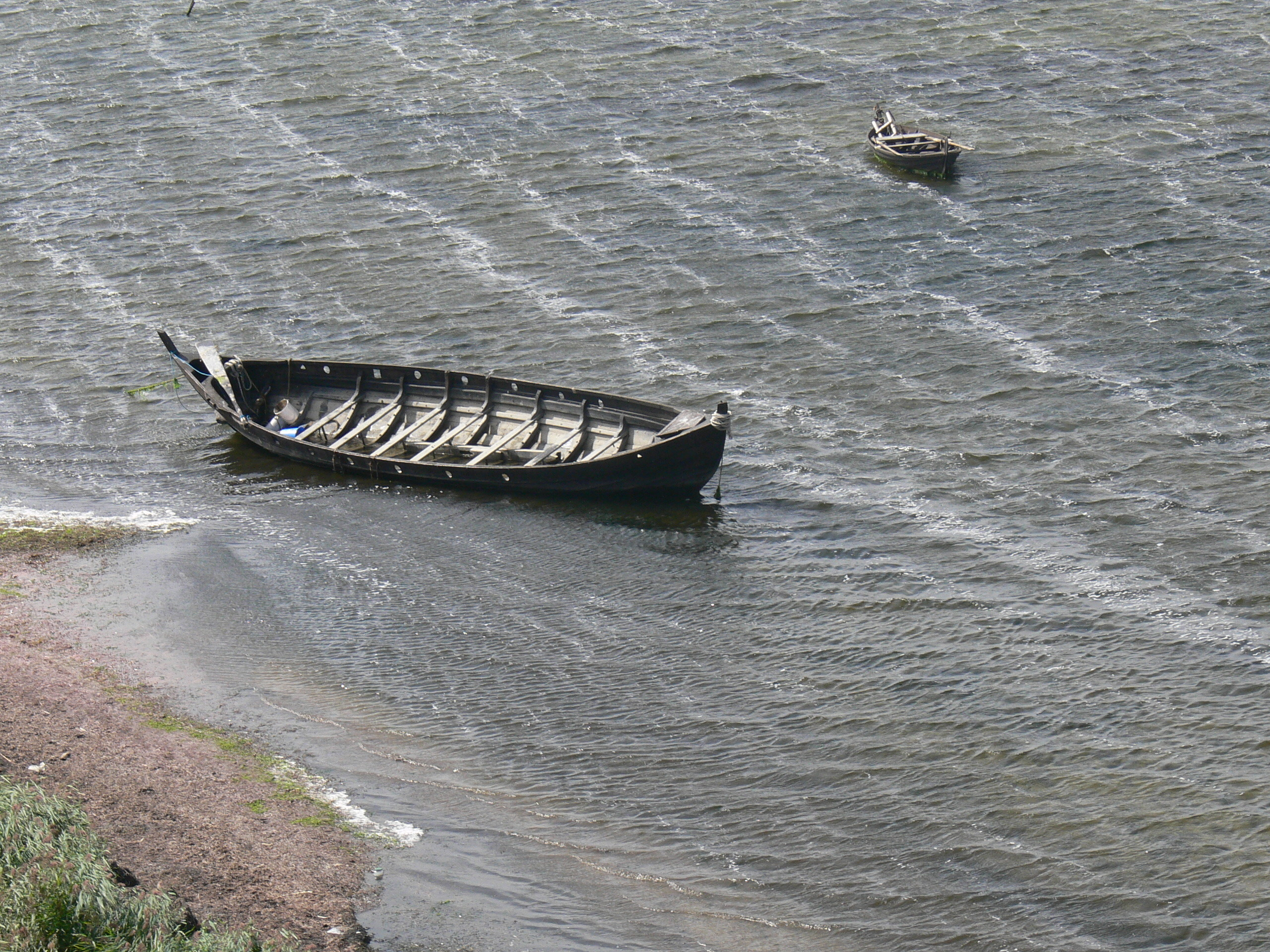 Wikinger Museum Foteviken in Skanör. Wikingerboote im Wasser vor der Siedlung